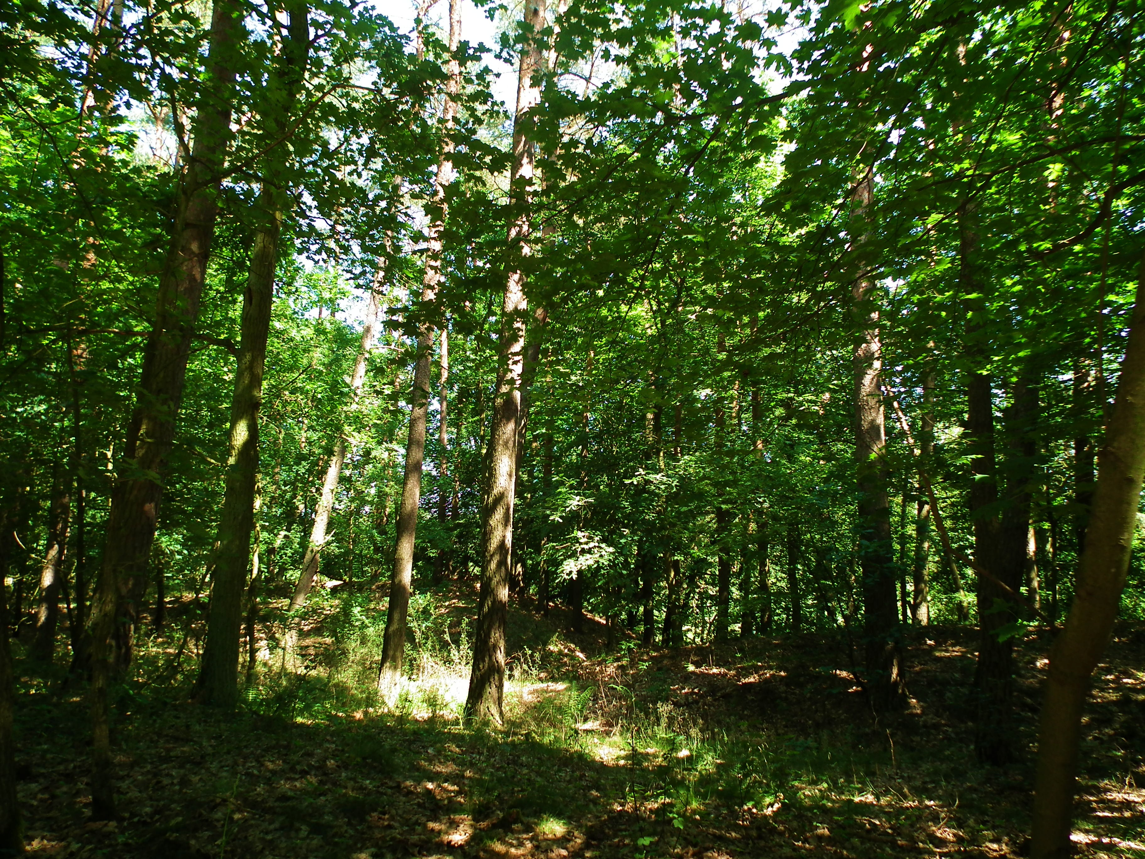 Obszar Natura 2000 Dąbrowy Obrzyckie. Rejon Brączewa.